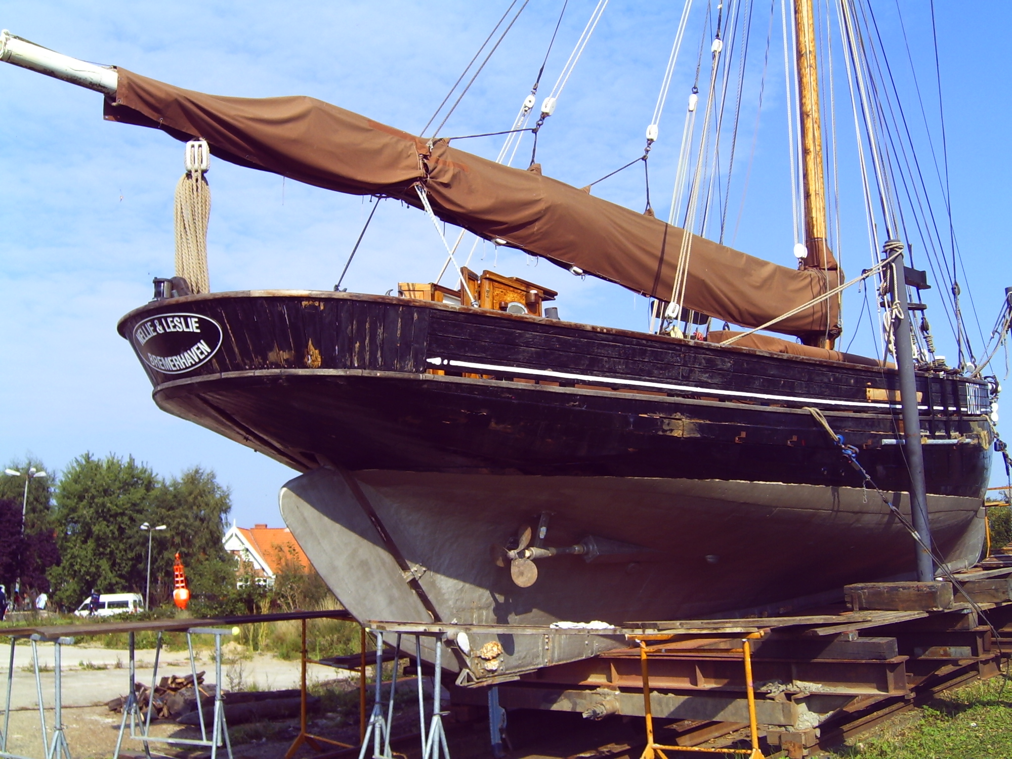 Nellie & Leslie, ein ehemaliger englischer Kutter, nun Heimathafen Bremerhaven